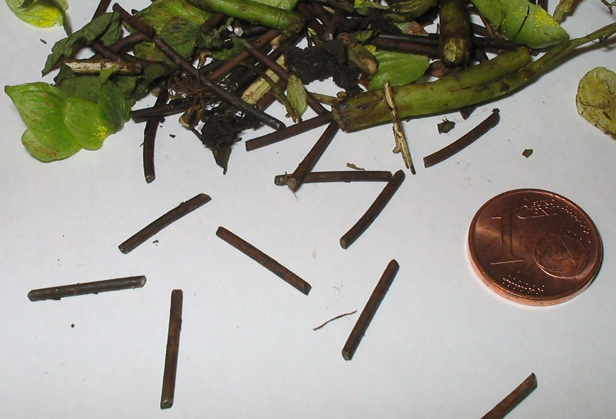 Hopfenspikes (Humulus lupulus)